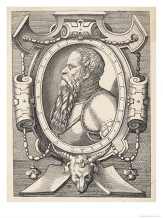 Gustav Vasa